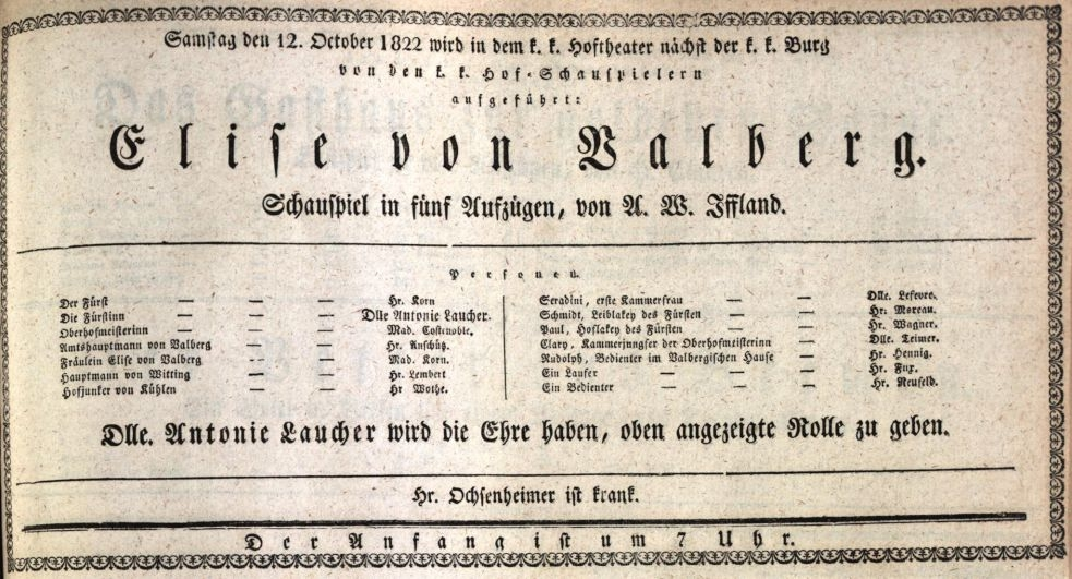 Theaterzettel des Hoftheaters nächst der Burg in Wien vom 12. Oktober 1822